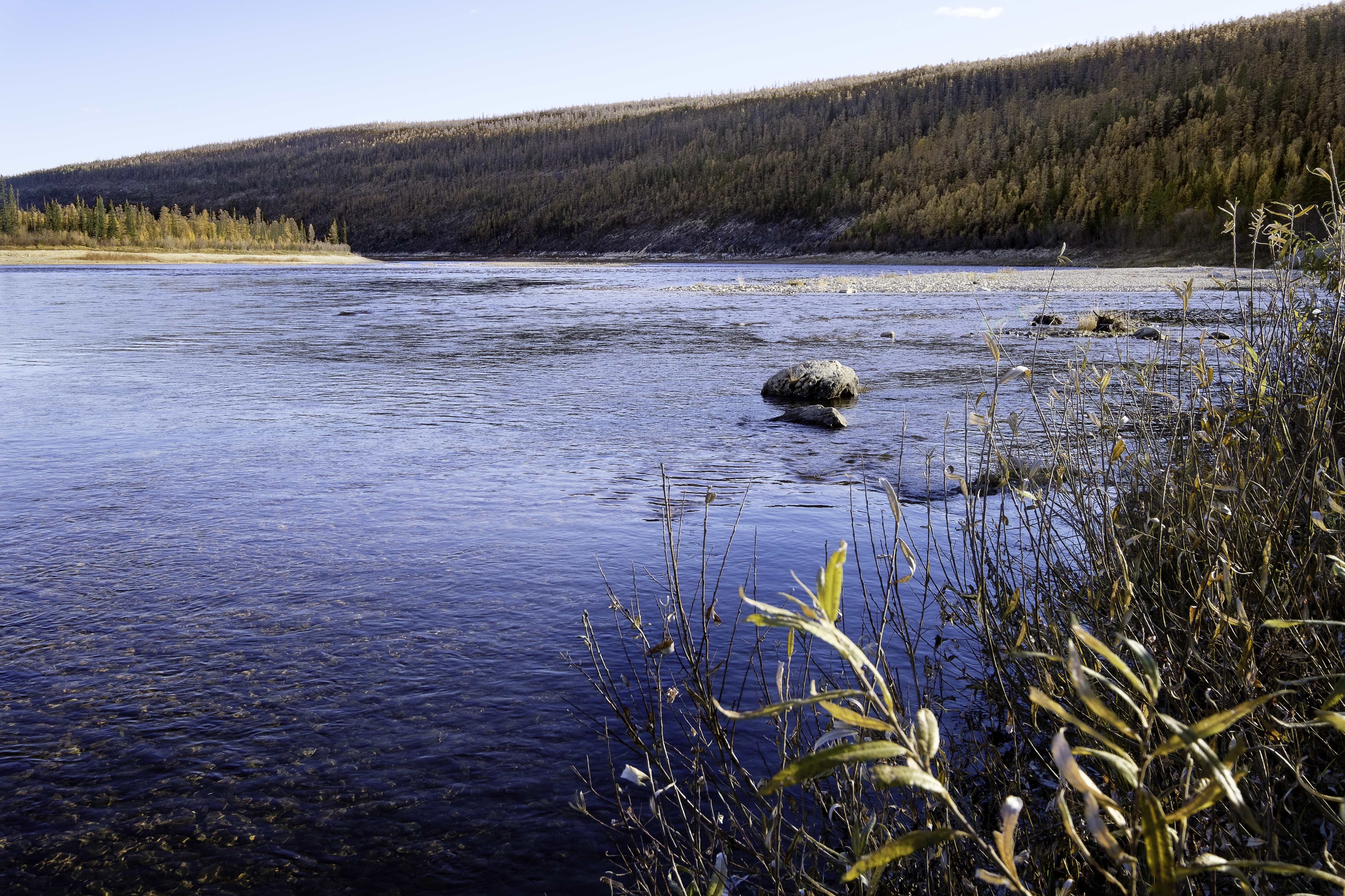 De rivier de Amga nabij het dorp Verchnjaja Amga gezien in stroomafwaartse richting (oosten).